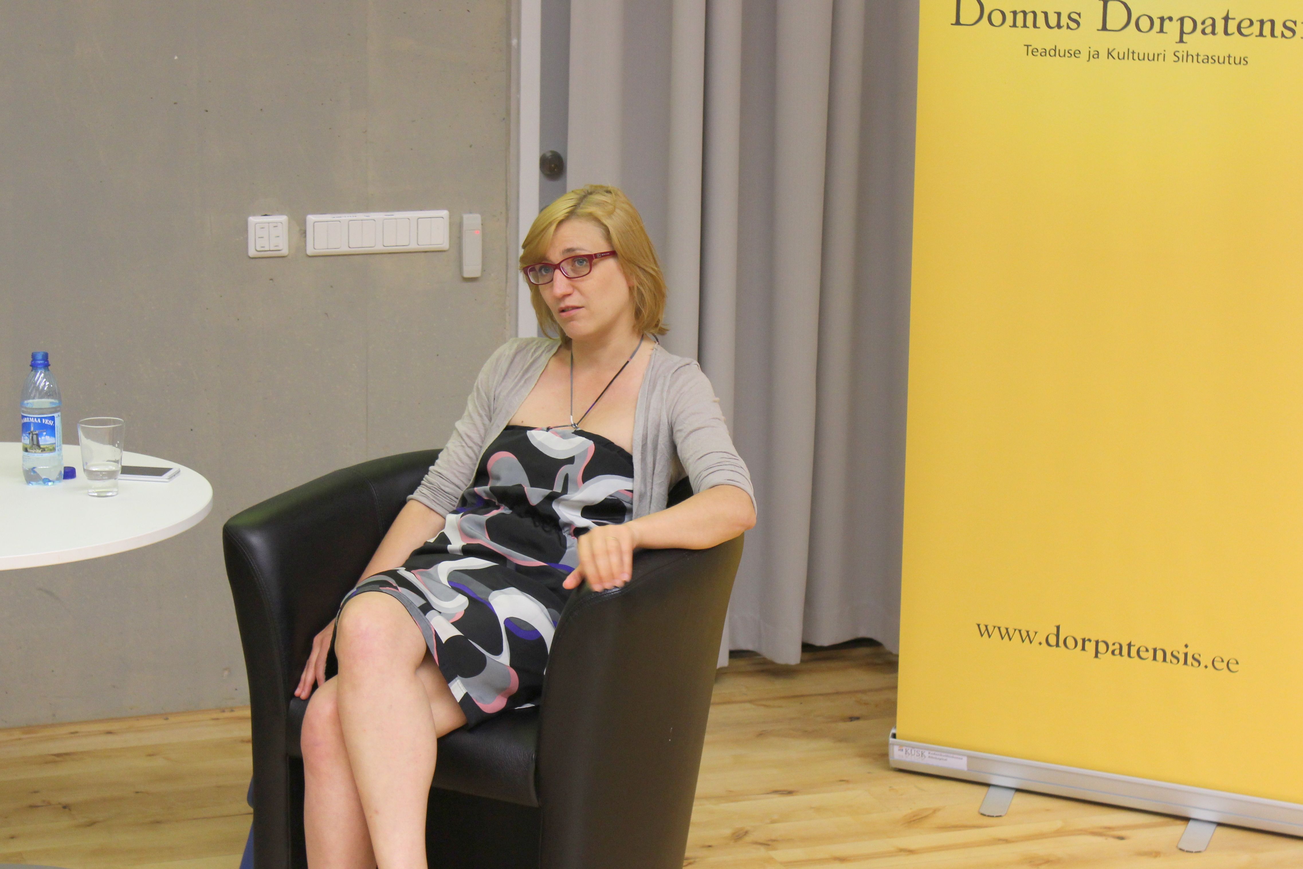 Gea Kangilaski Mõtlemiskonverentsil AHHAA keskuses.